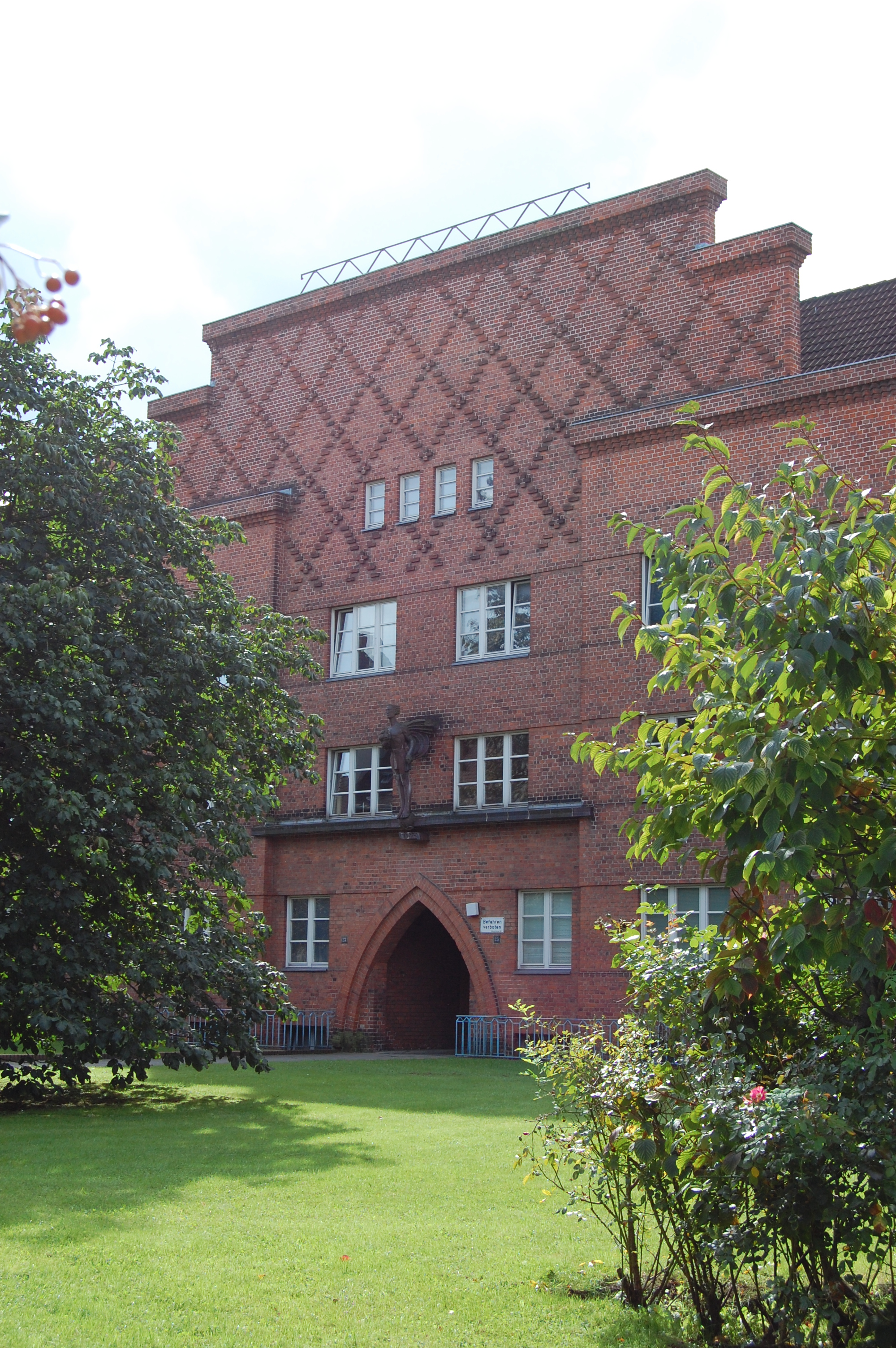 Marineviertel